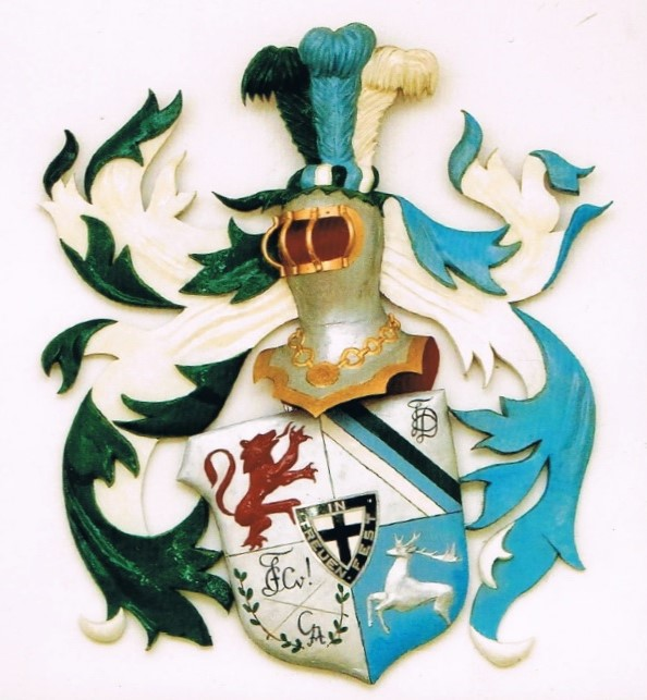 Studentenwappen des Baltencorps Curonia Goettingensis